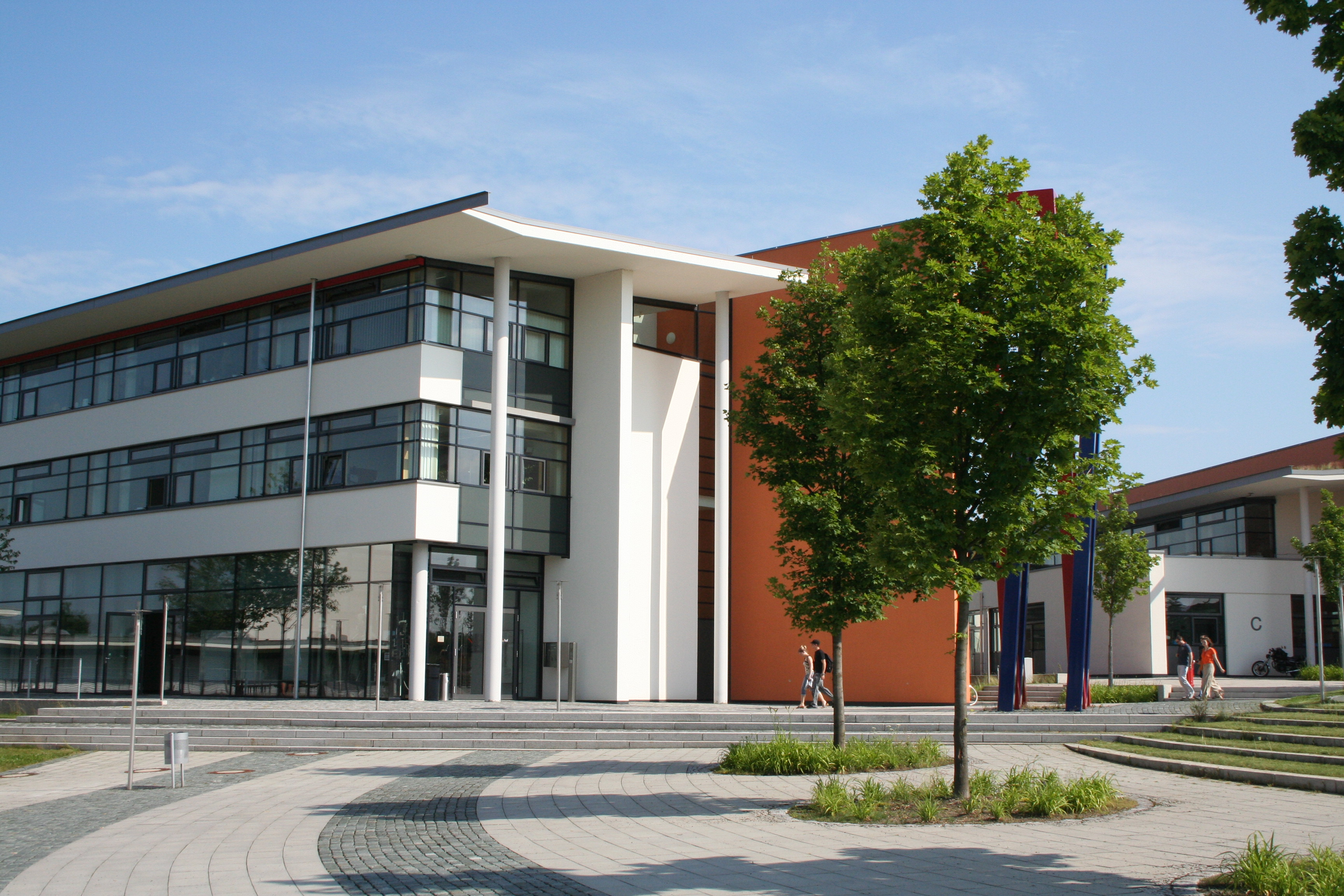 Hochschule Hof